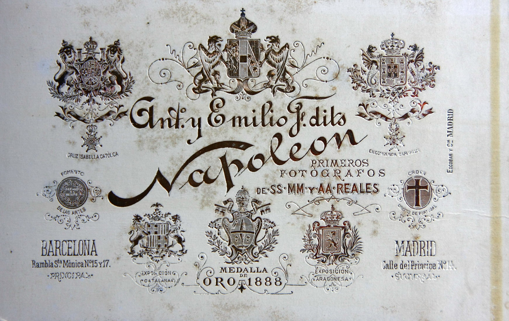 Suport fotogràfic (tipus postal) dels fotògrafs Napoleón (Barcelona 1851-1968).